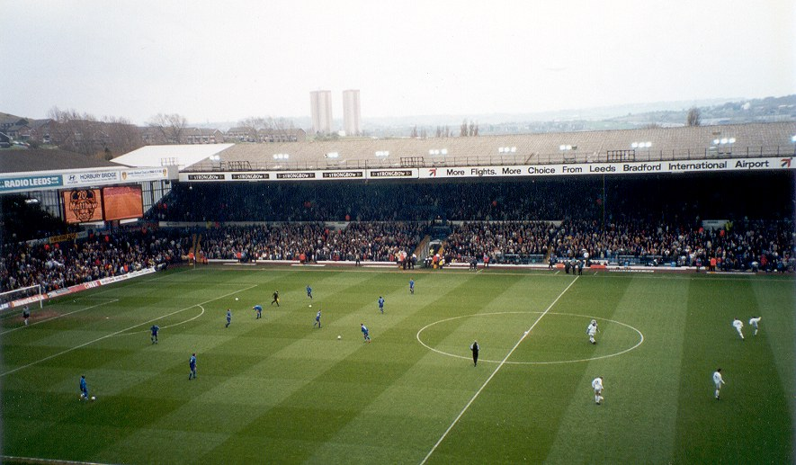 Match details